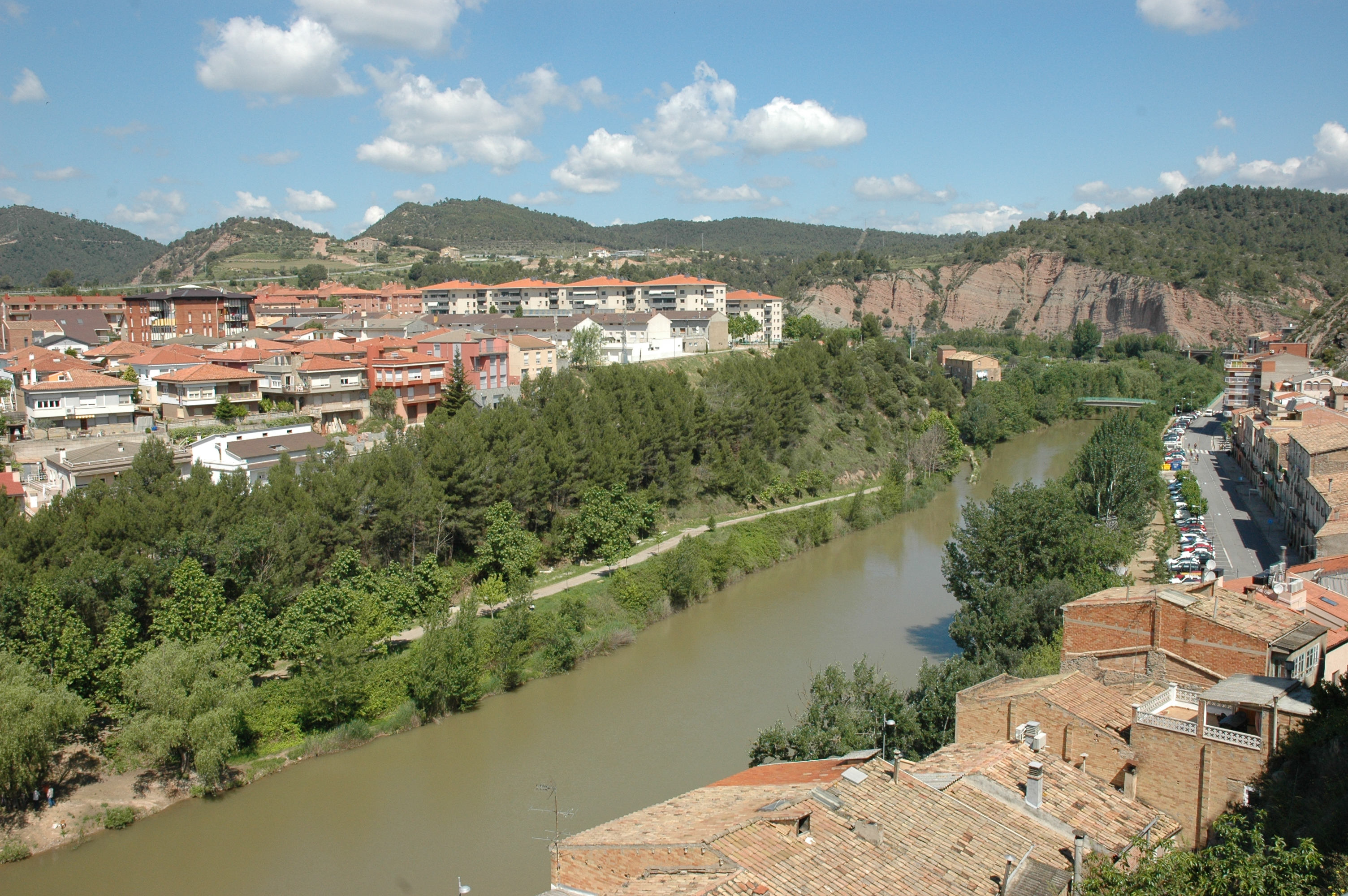 Súria - Barri de Salipota